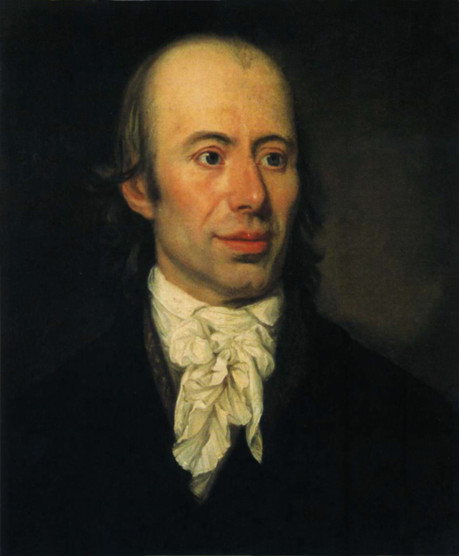 Rückseite: "J. H. Voss. / gemalt zu Halberstadt 1797 / von G. F. Schöner. / Original"